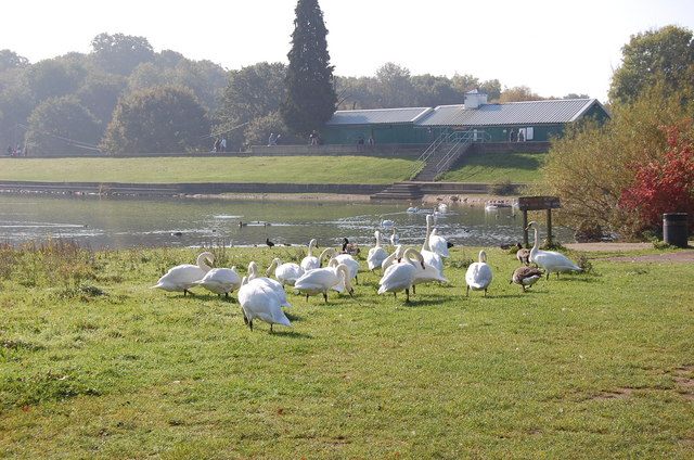 Swans at Ruislip Lido